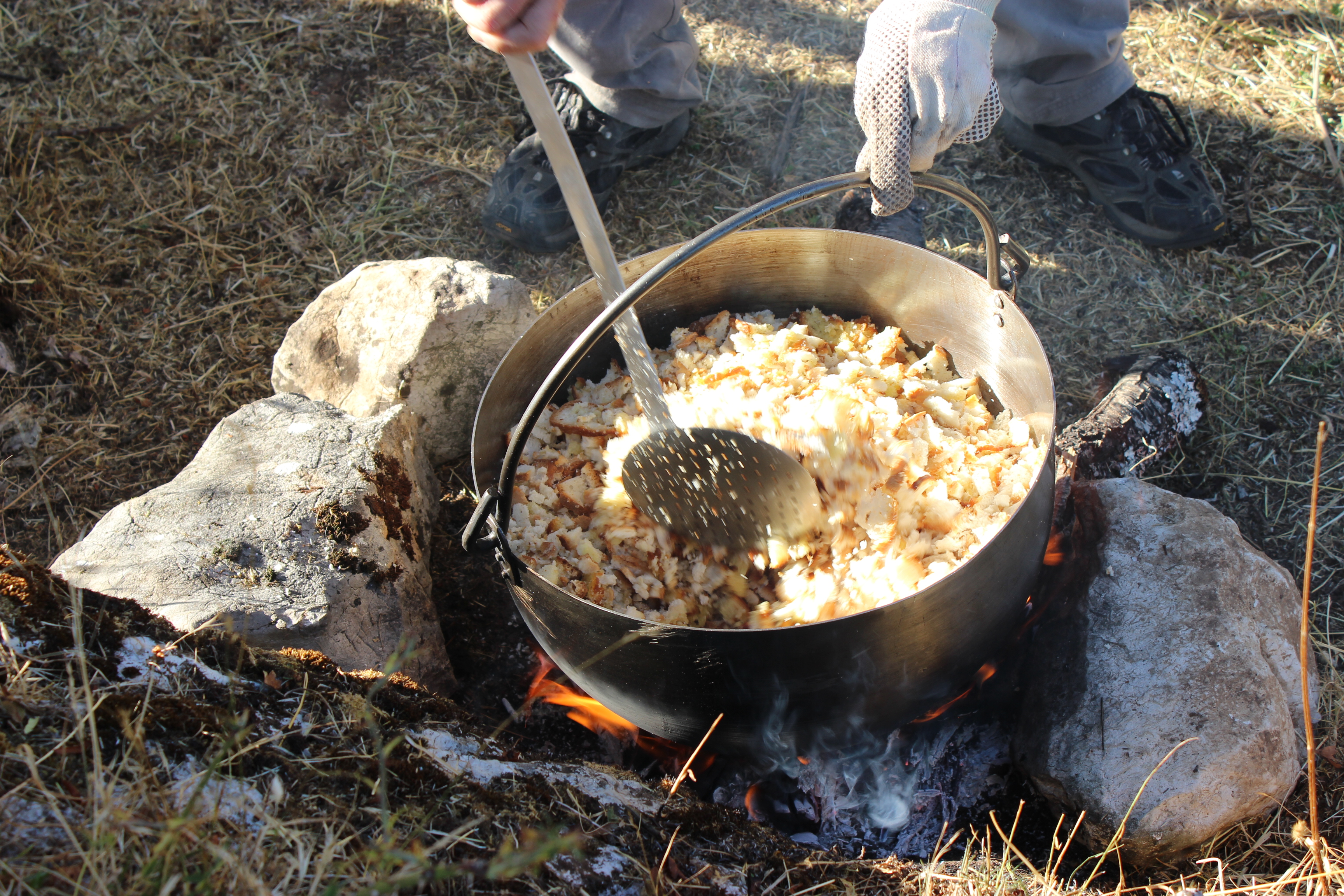 proceso de elaboración de migas pastoriles